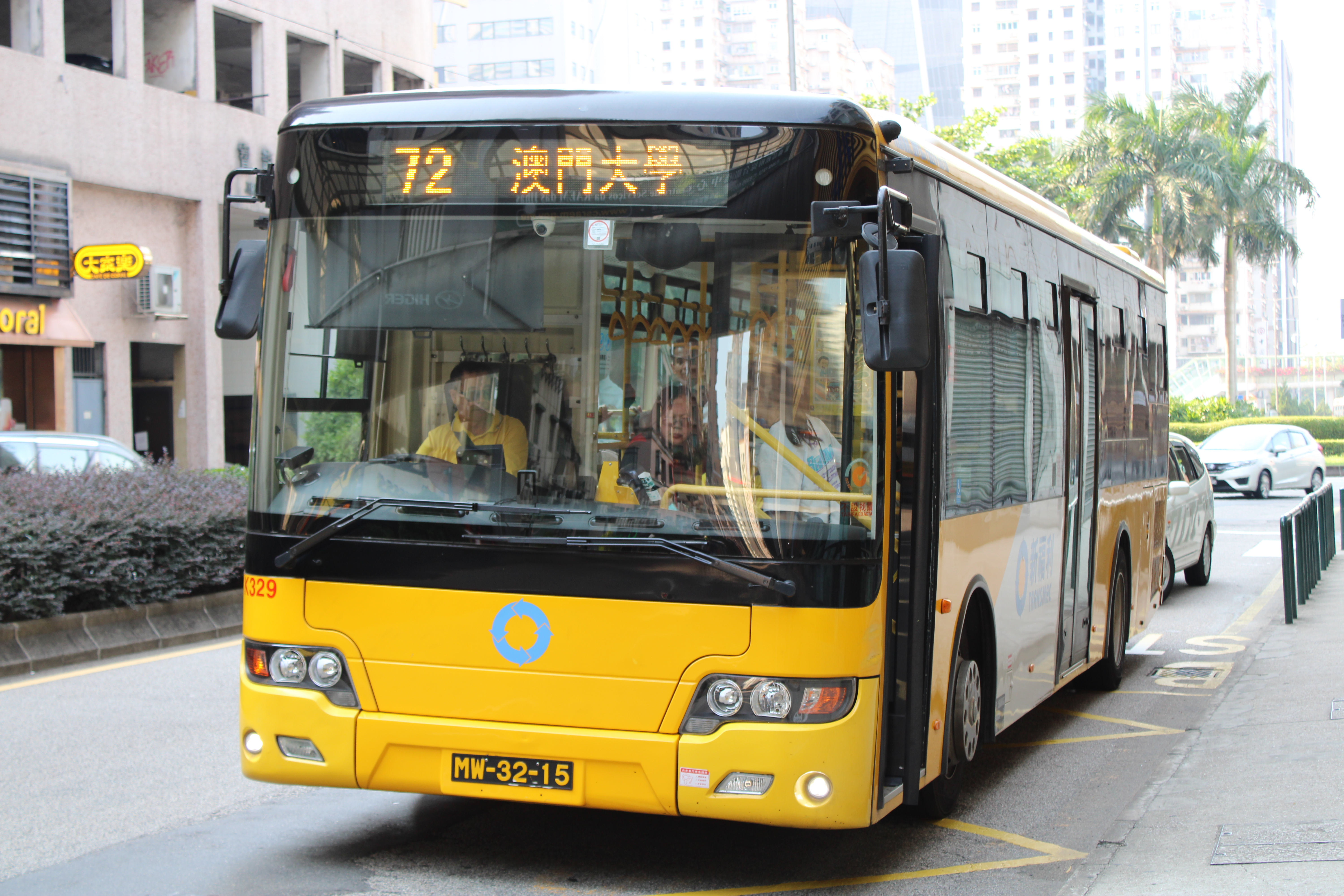 新福利蘇州金龍KLQ6108GQ28E4行駛72路線。